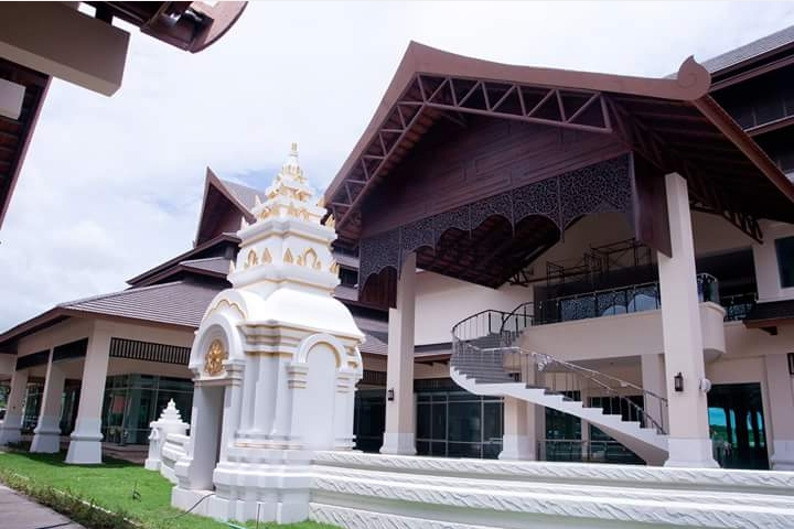 LampangAirport